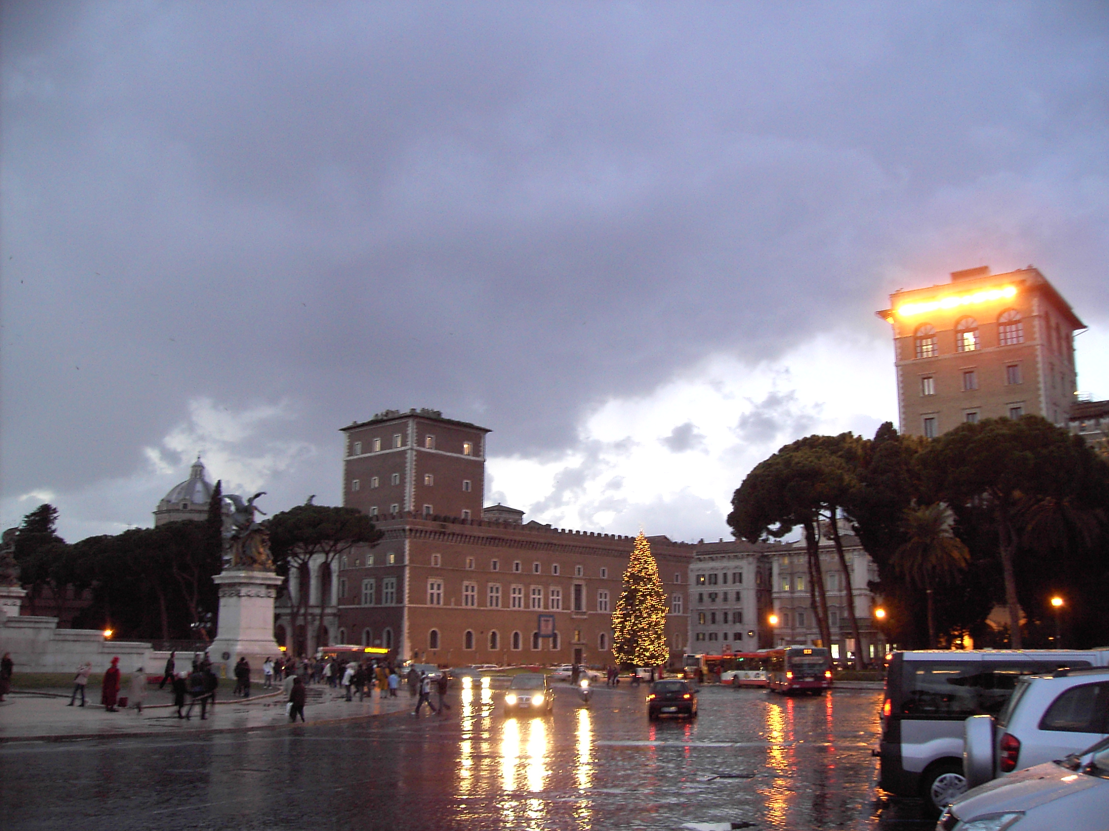 Roma, piazza e palazzo Venezia a Natale